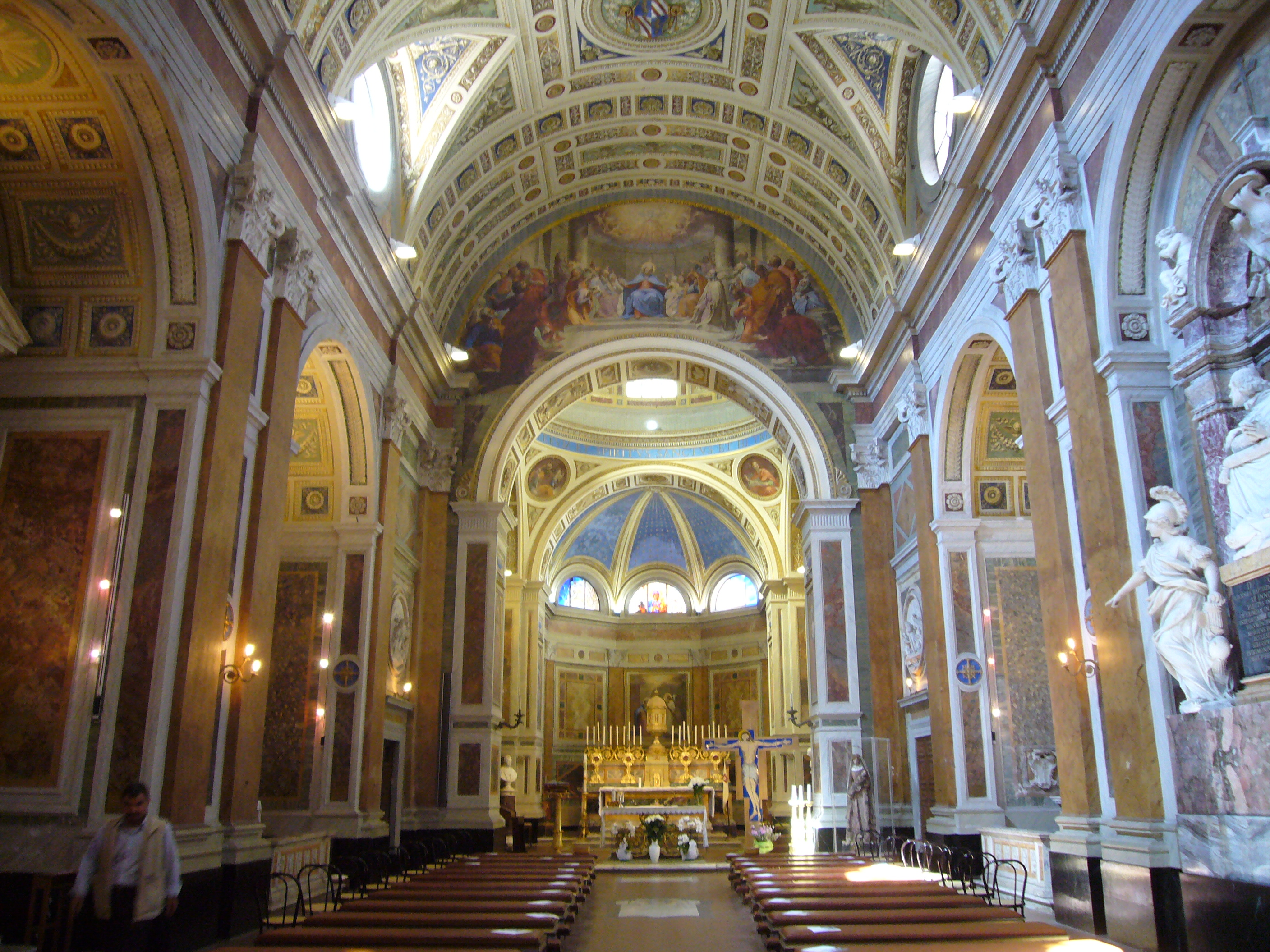 Roma, Spirito Santo dei Napoletani, interno